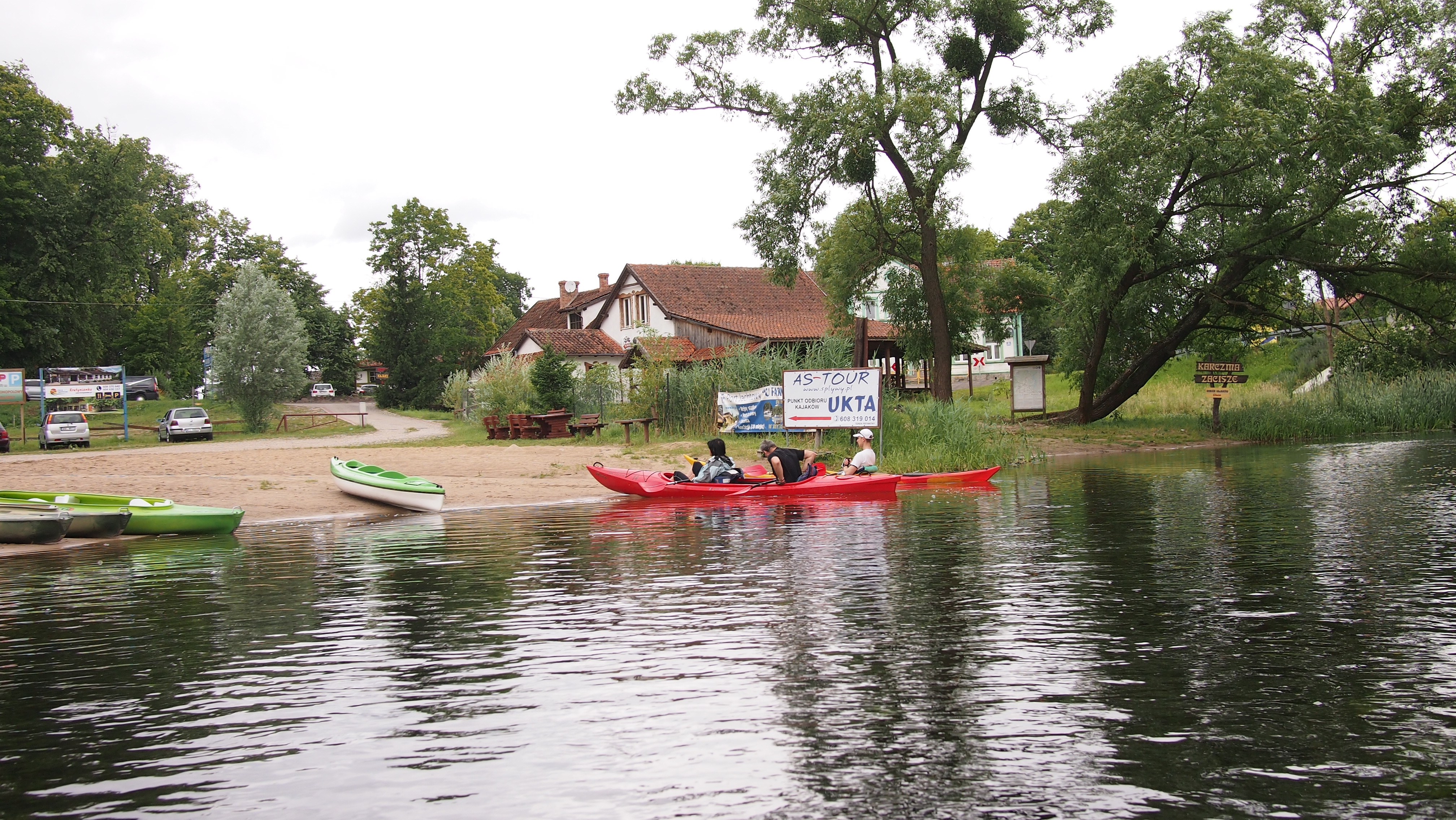 Ukta, Poland